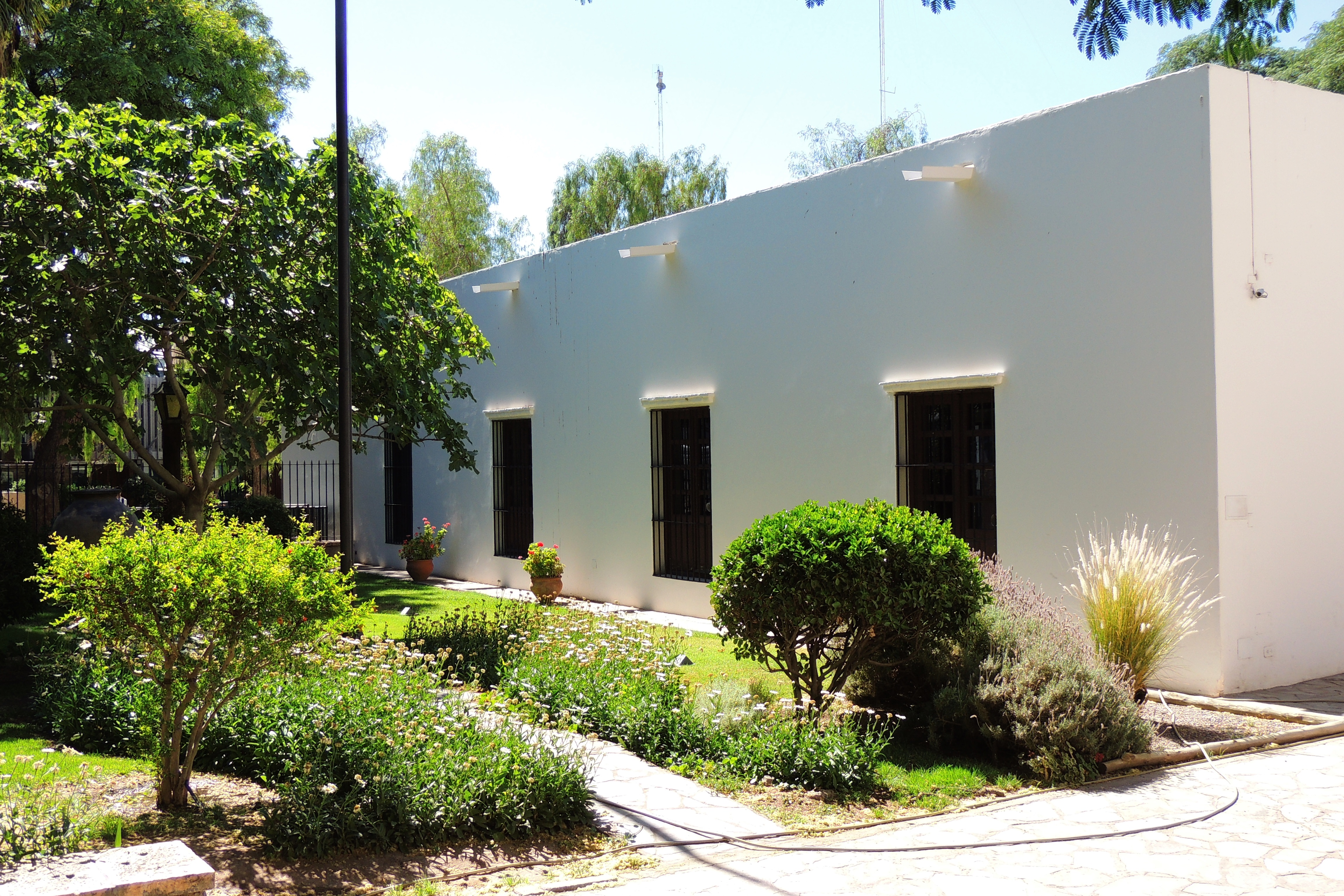 Ciudad de San Juan, Argentina